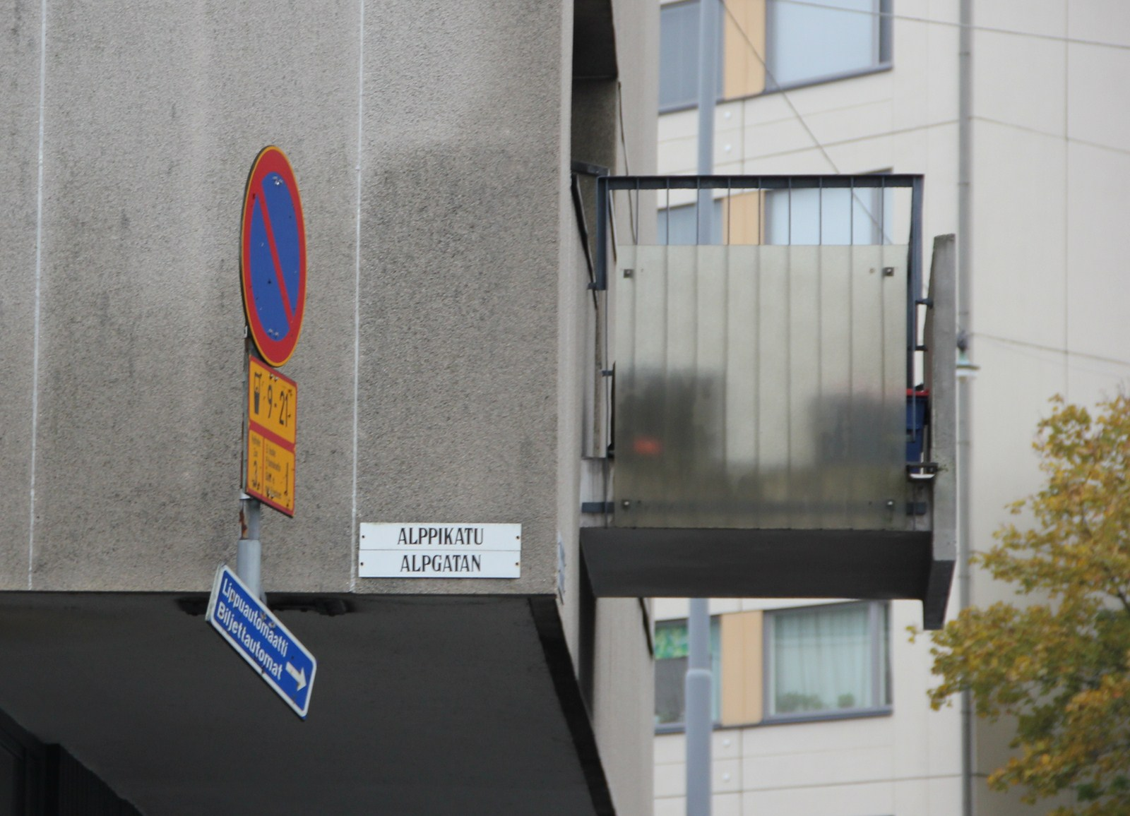 Alppikatu, Kallio, Helsinki